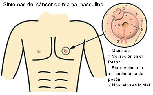 Descripción gráfica de uno de los efectos secundarios del Finasteride: El cáncer de mama masculino.